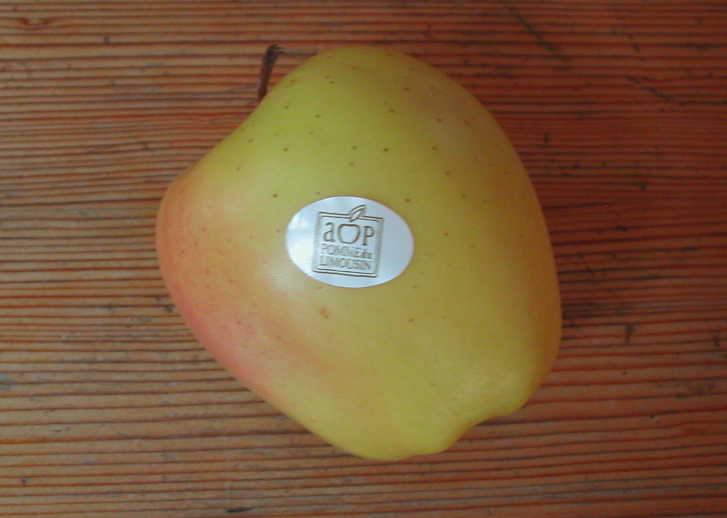 Photo d'une pomme du Limousin AOP, où l'on voit bien la légère coloration rosée.